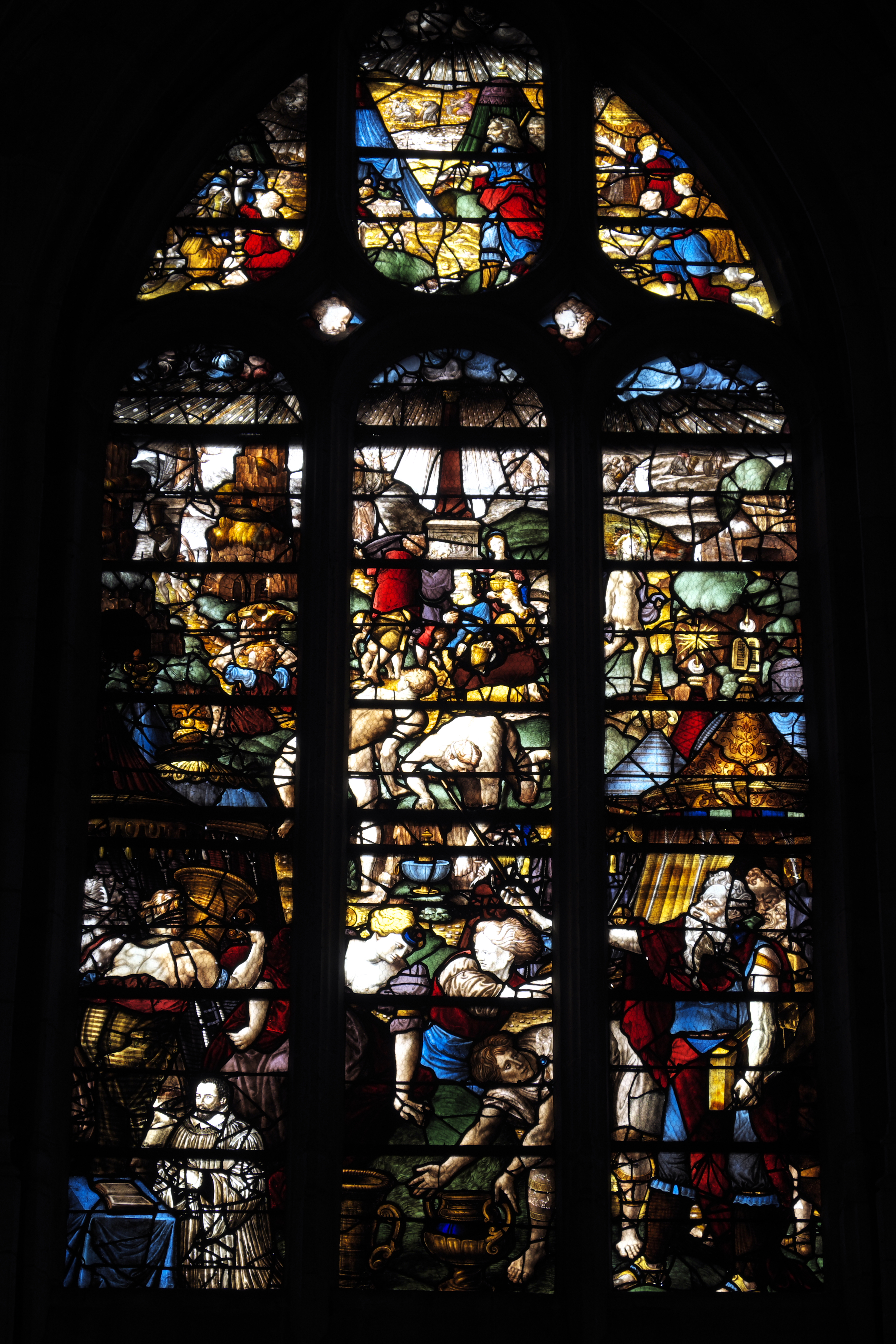 Katholische Kirche Sainte-Foy in Conches-en-Ouche im Département Eure (Haute-Normandie/Frankreich), Bleiglasfenster aus dem 16. Jahrhundert, Darstellung: Moses